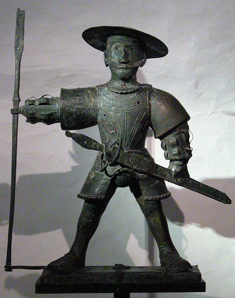 Tallinner Rathaus: Das Original des Alten Thomas’ („Vana Toomas“) von 1530, Wahrzeichen der Stadt. Zum Schutz vor schädlichen Umwelteinflüssen befindet es sich heute im Museum des Rathauses. Auf der Turmspitze befindet sich eine Kopie.